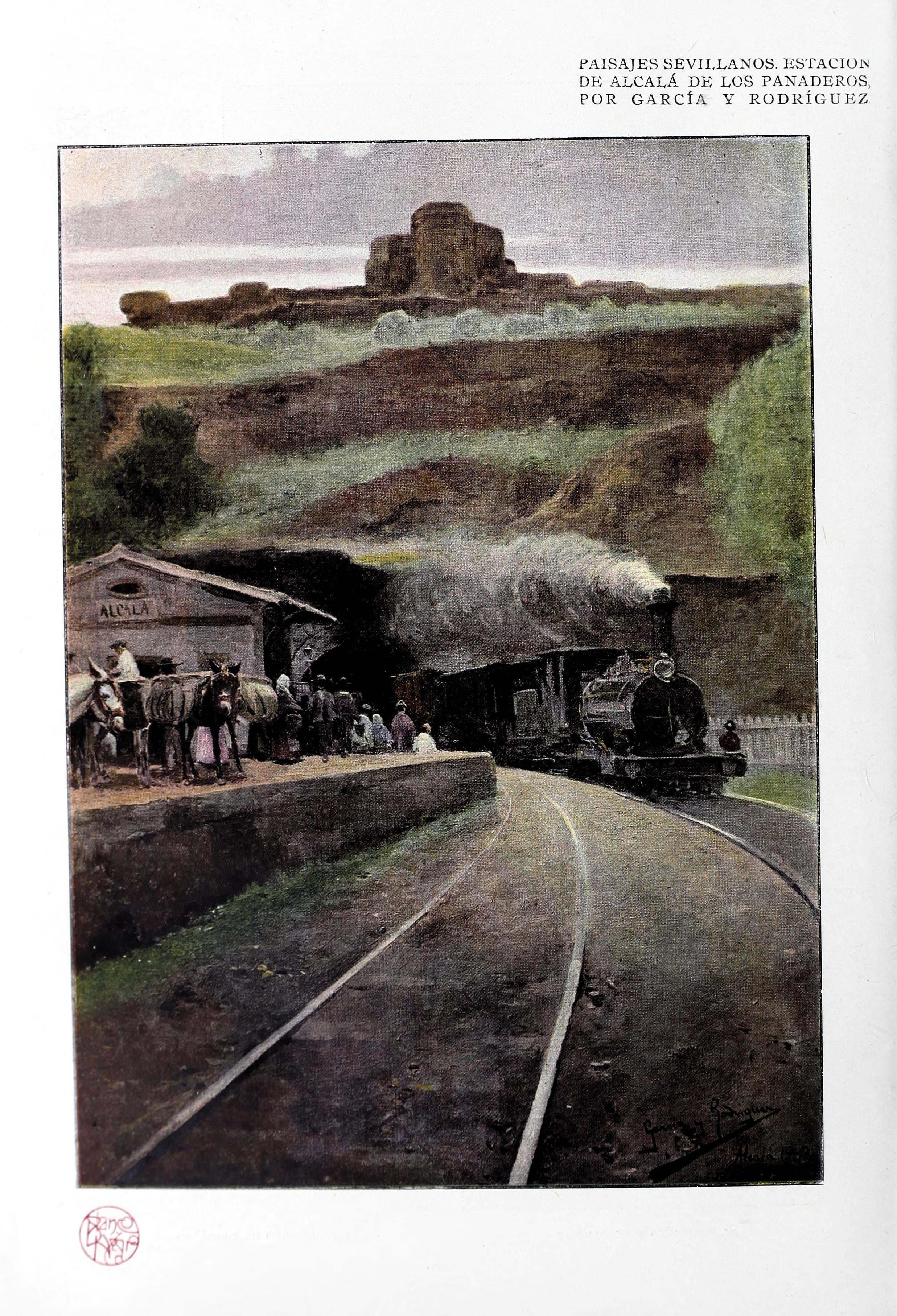 Paisajes sevillanos. Estación de Alcalá de los Panaderos, por García y Rodríguez.